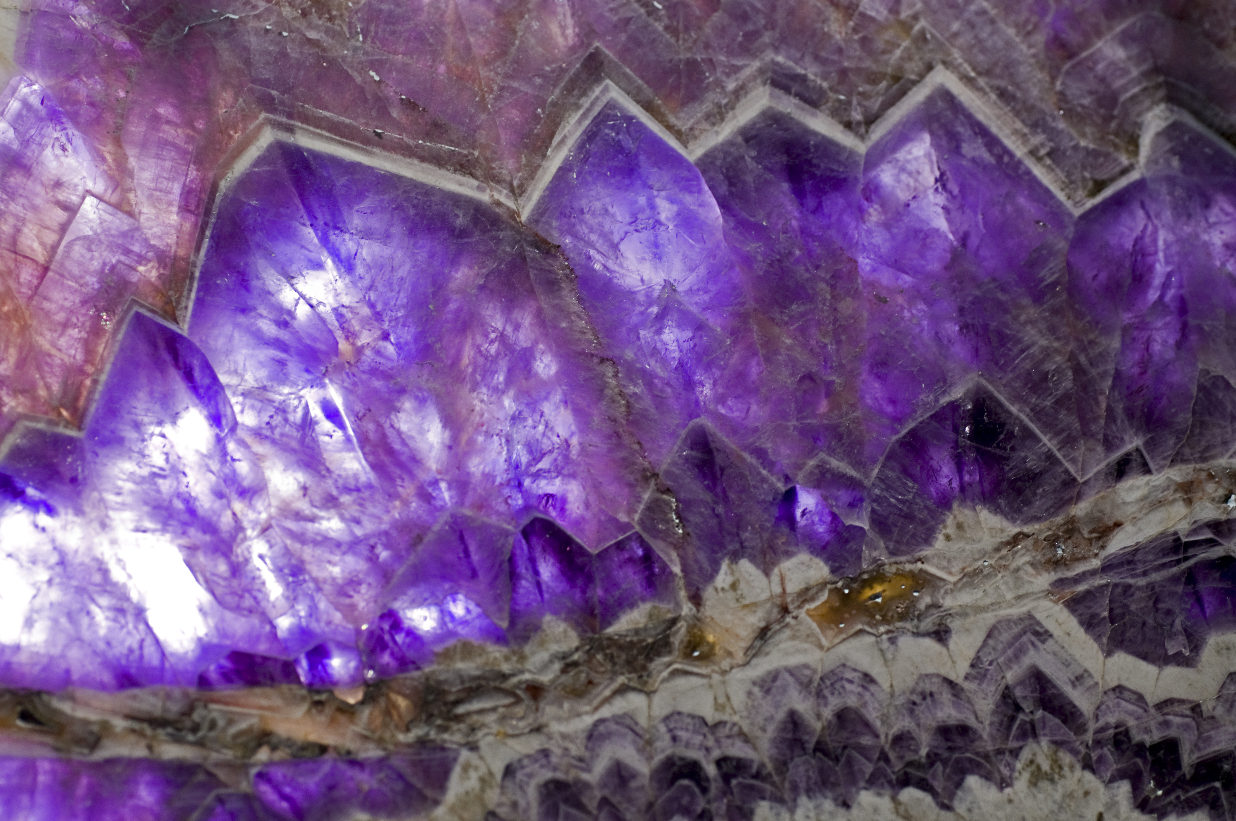 Mineraliensammlung des Naturmuseums Senckenberg Amethyst